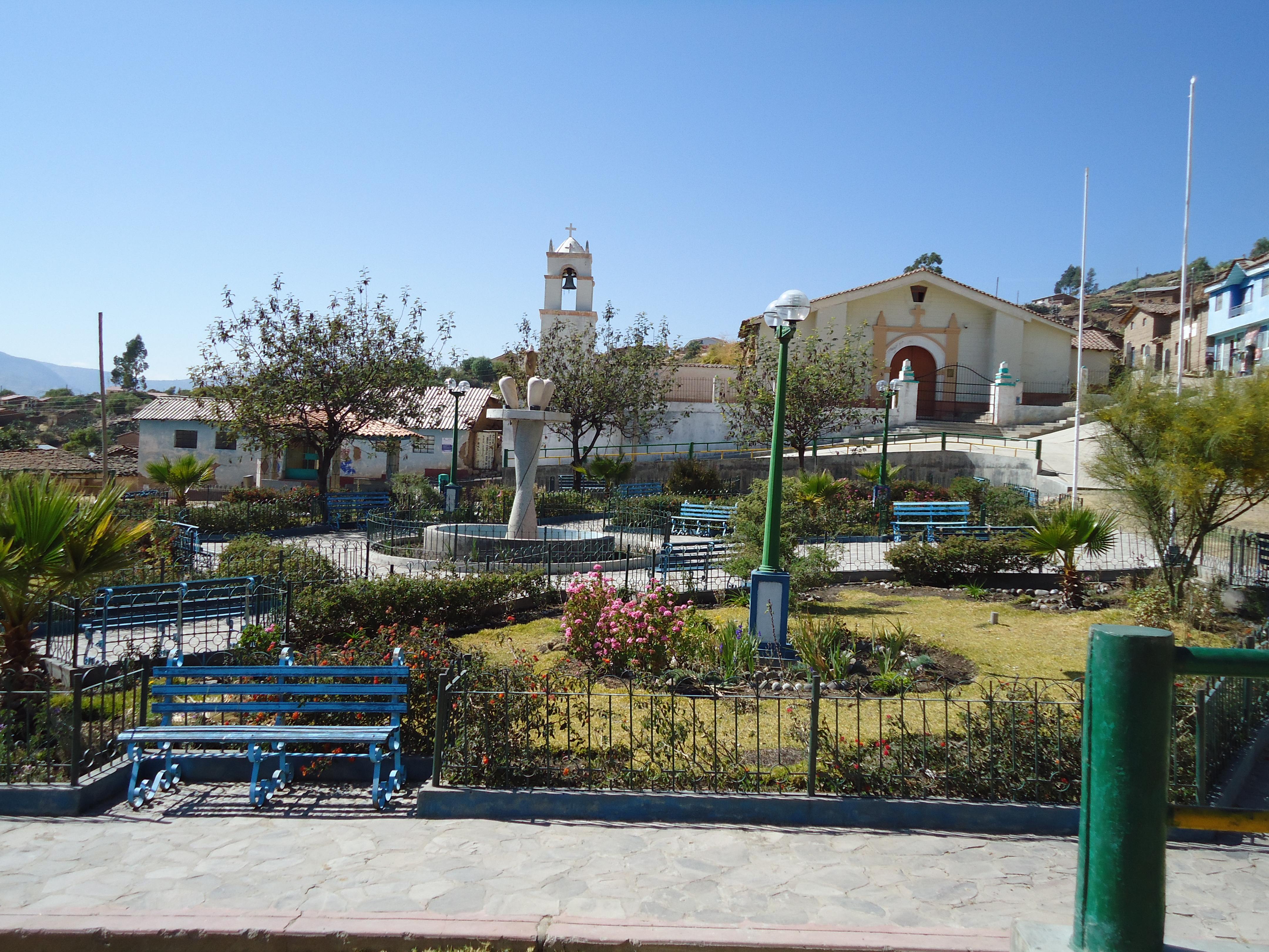 parque del distrito de cayara